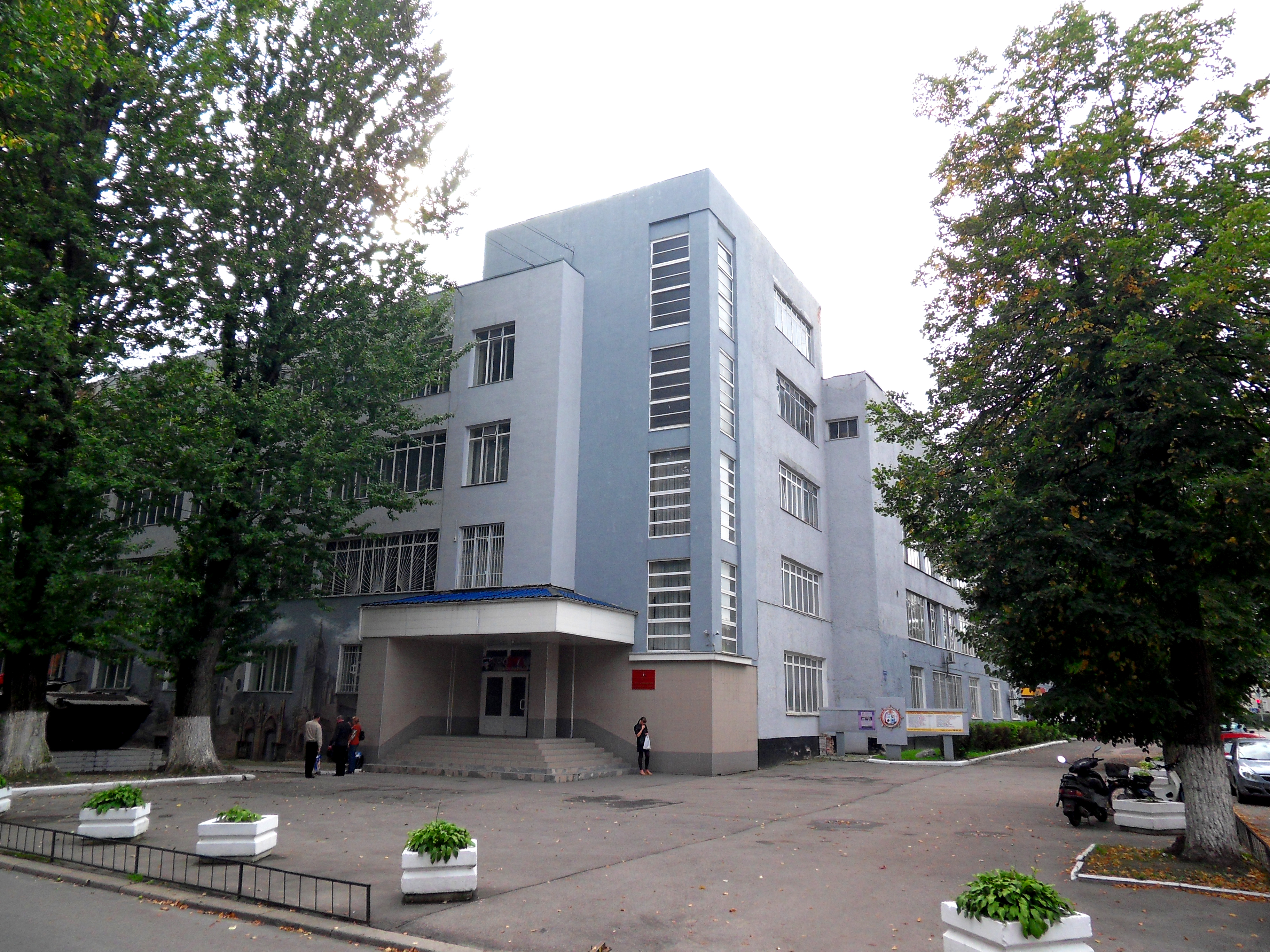 Здание женского ремесленного училища (Калиниградская область, Калининград, кирова улица, 7)